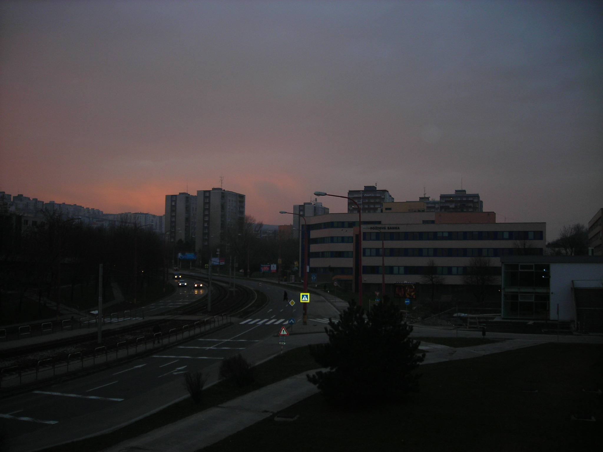 pohľad na hlavnú komunikáciu